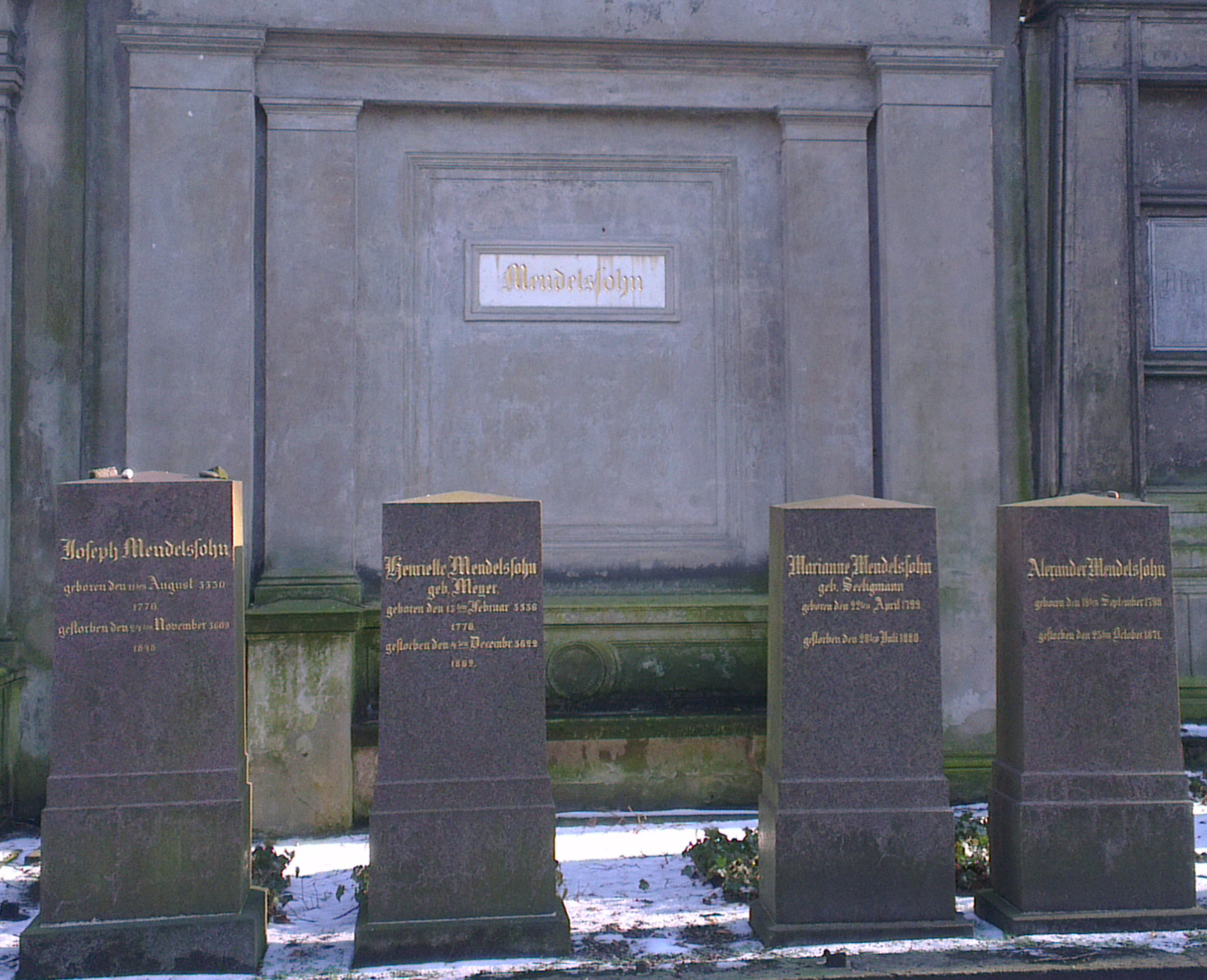 Auf dem Jüdischen Friedhof in der Schönhauser Allee 22, 10435 Berlin Von LINKS: Joseph Mendelssohn (1770-1848), ältester Sohn von Moses Mendelssohn Gemahlin: Henriette Meyer (1776-1862) Schwiegertochter: Marianne Seeligmann (1799-1880), Sohn: Alexander Mendelssohn (1798-1871)